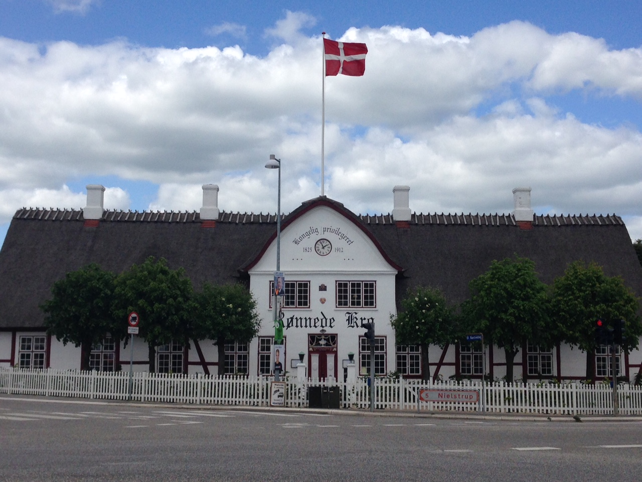 Rønnede Kro i 2015